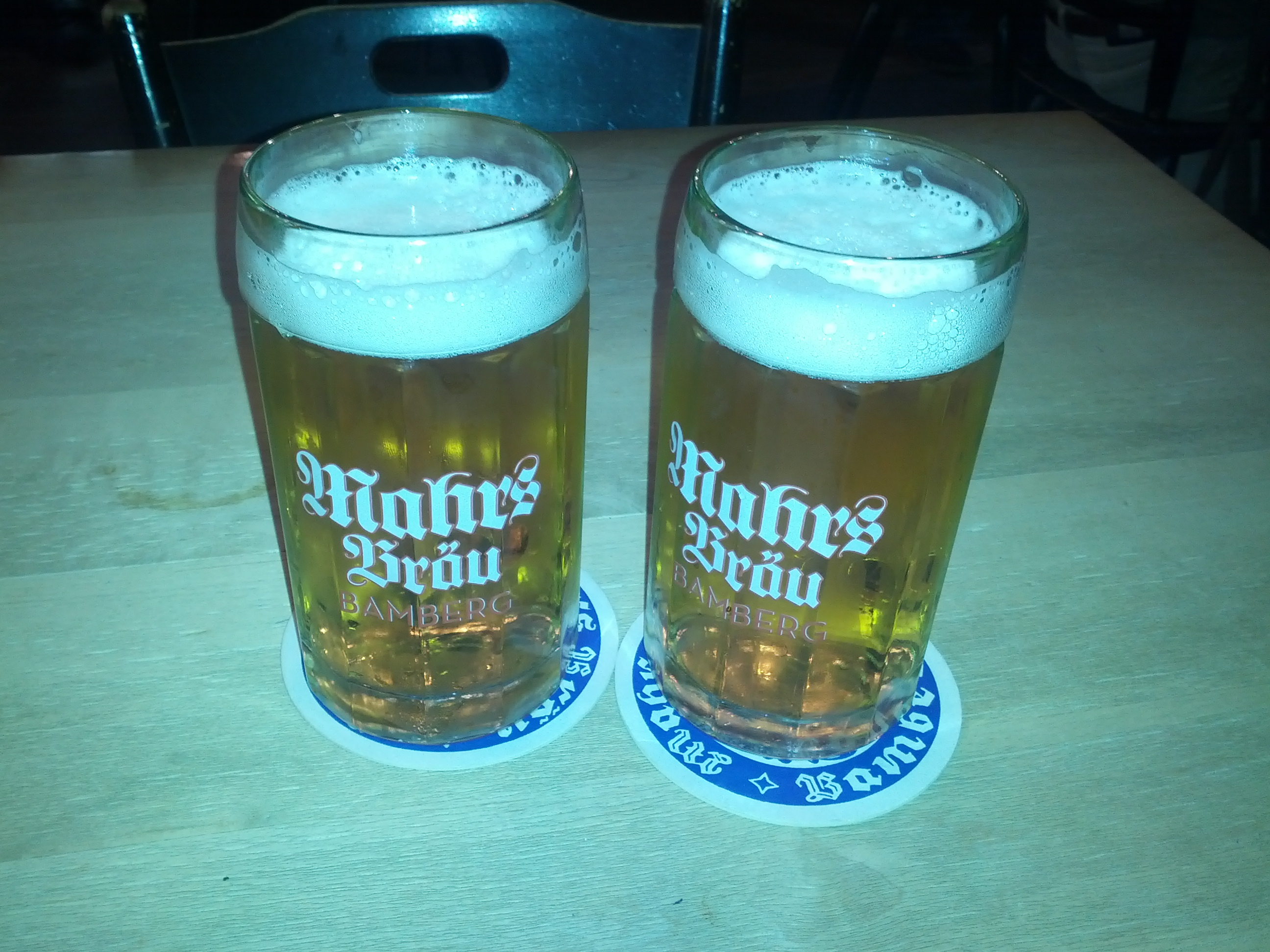 Bier der Bamberger Brauerei Mahr